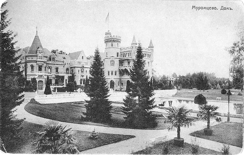 Усадьба Храповицкого на старой открытке. Дом